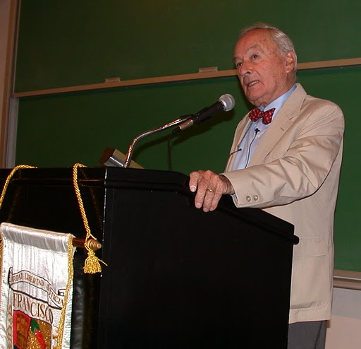 Manuel Ayau dando una cátedra.